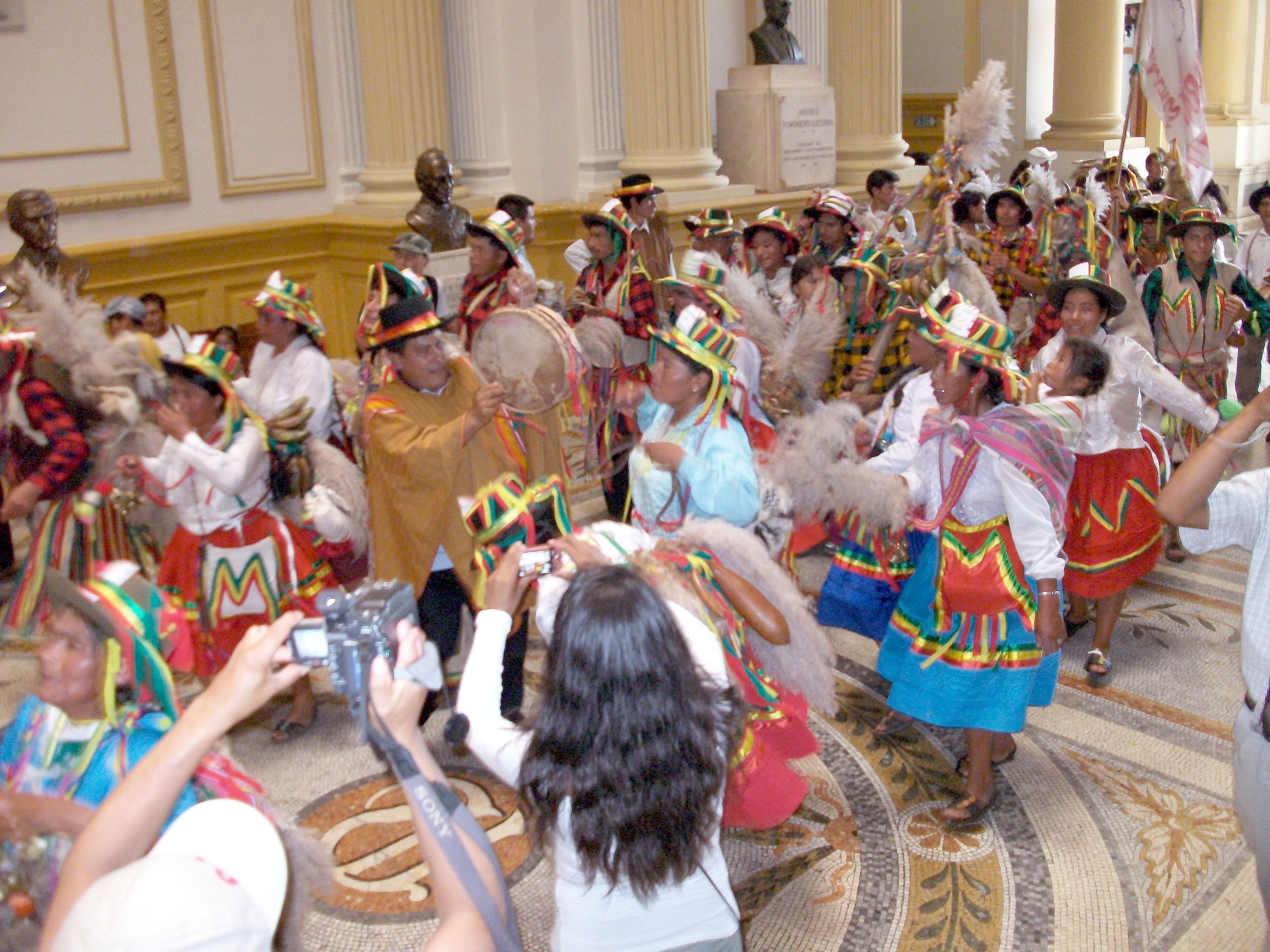 Con un colorido pasacalle los congresistas Agustín Molina, Jhon Reynaga y Antonio Medina, hicieron el lanzamiento del Décimo Encuentro Nacional del Carnaval de la provincia de Andahuaylas (Apurímac) "Pukllay 2012", a celebrarse en marzo y que según el legislador Molina esa celebración permite el reencuentro del campo y la ciudad.